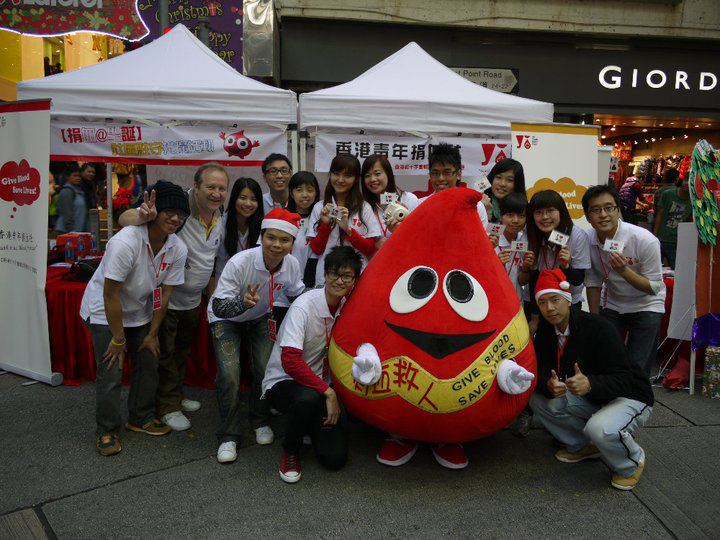 中文（香港）: 社區捐血推廣活動